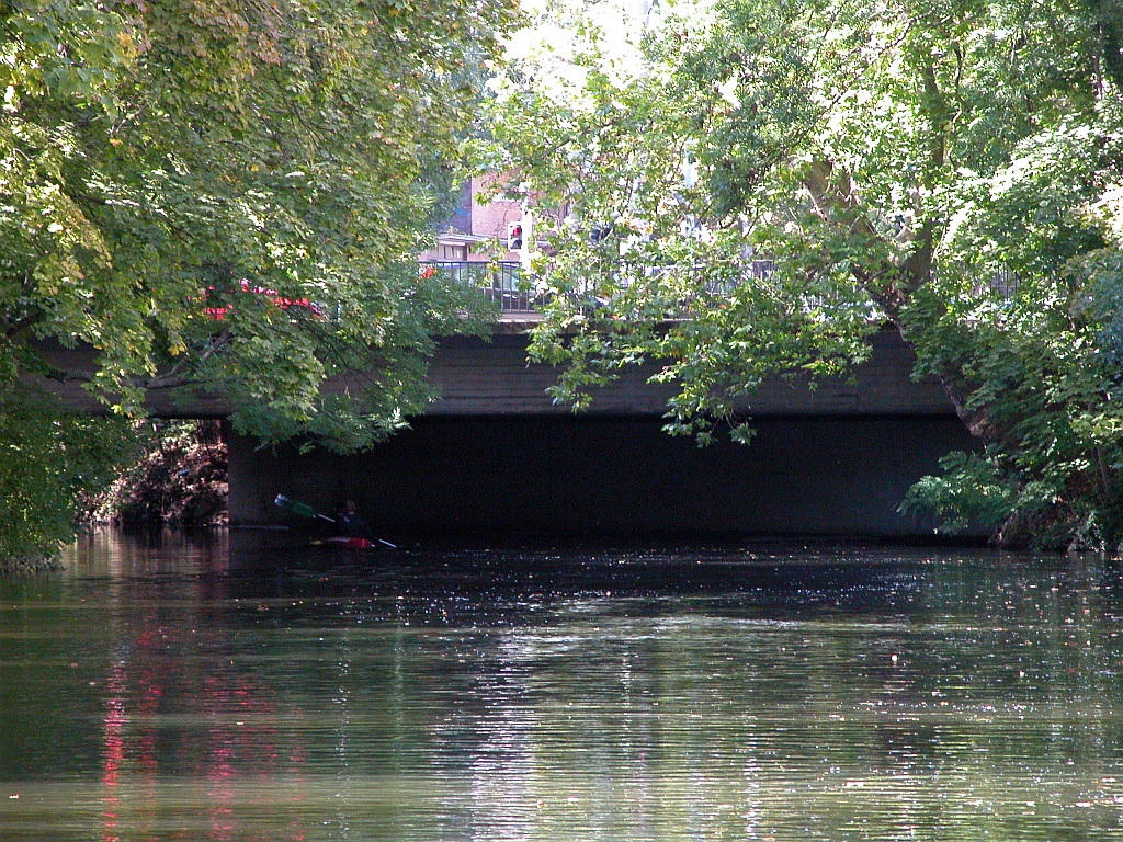 Braunschweig: Augusttor-Brücke von Osten gesehen.